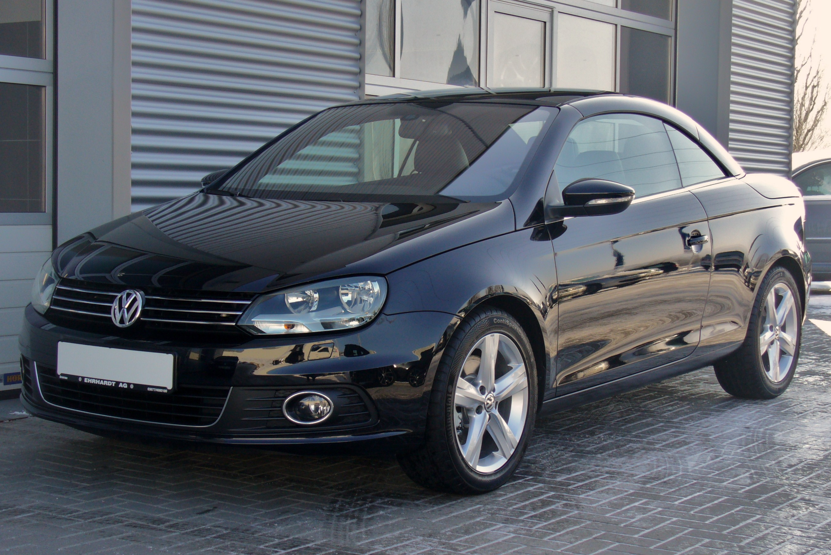 VW Eos Facelift